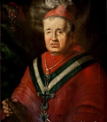 Retrato del cardenal Manuel Joaquín Tarancón y Morón (1782-1862), que fue arzobispo de Sevilla y obispo de Córdoba y de Osma. Fue pintado en el siglo XIX por José María Romero López.